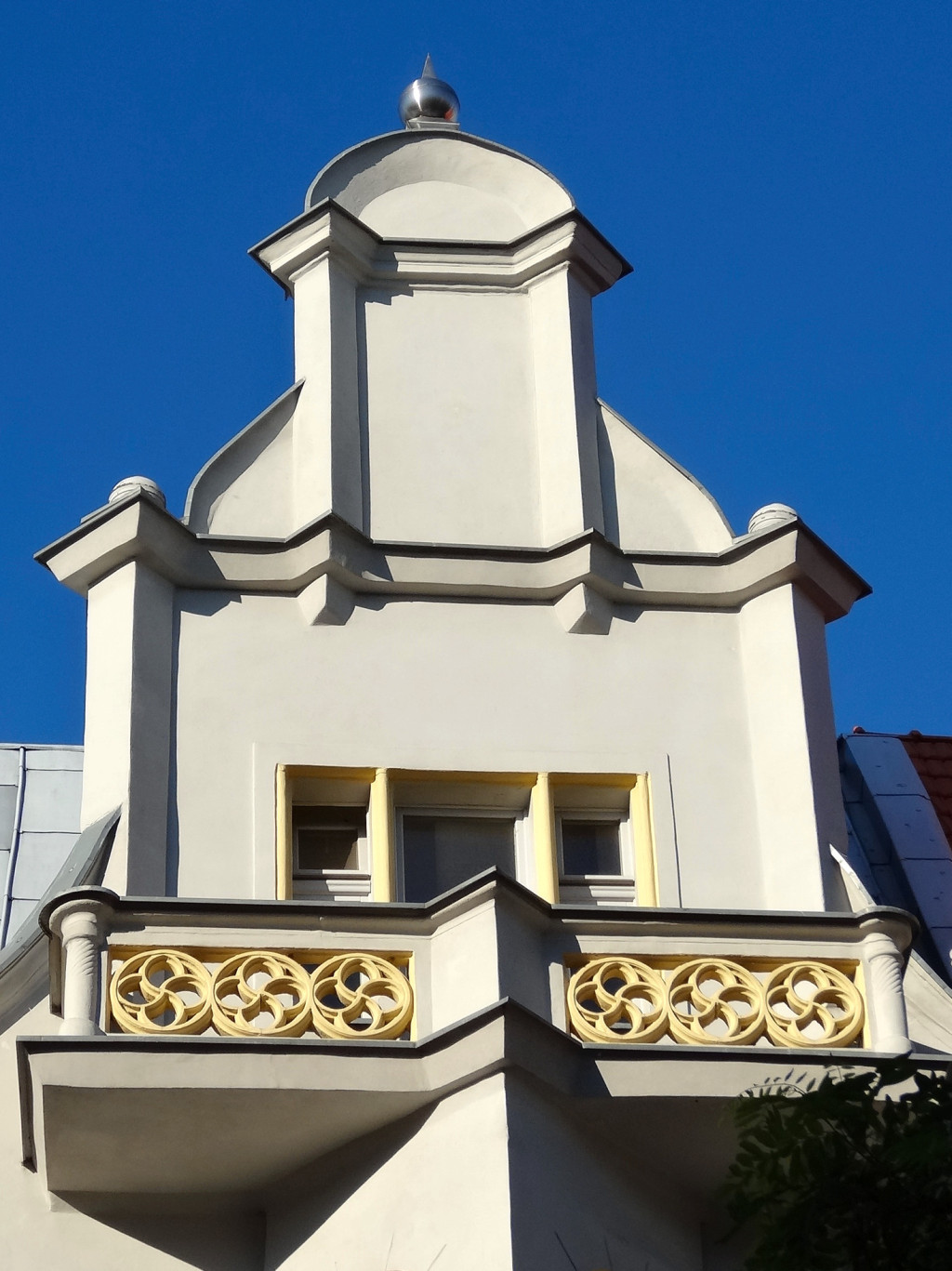 Kamienica przy ul. Cieszkowskiego 11 w Bydgoszczy (1898-1899 Józef Święcicki)